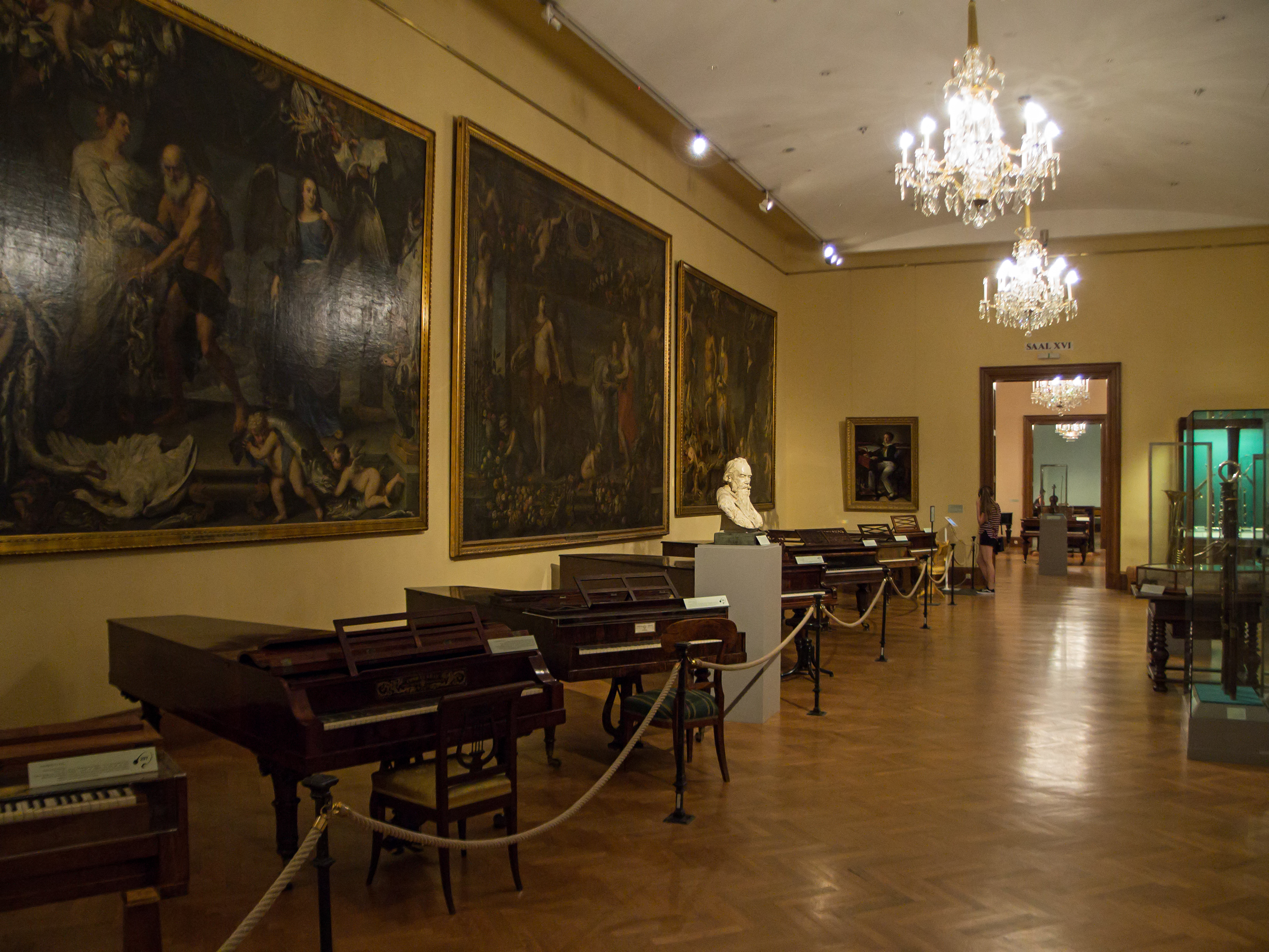 Hofburg (Neue Burg), die das Haus der Geschichte Österreich (HGÖ) beherbergen wird: Schauräume vor der musealen Adaptierung.